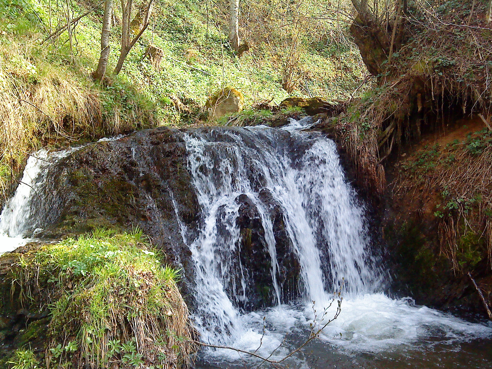 Поток Шупур м.в. Аламаница с.Ѓавато во пролетеен месец